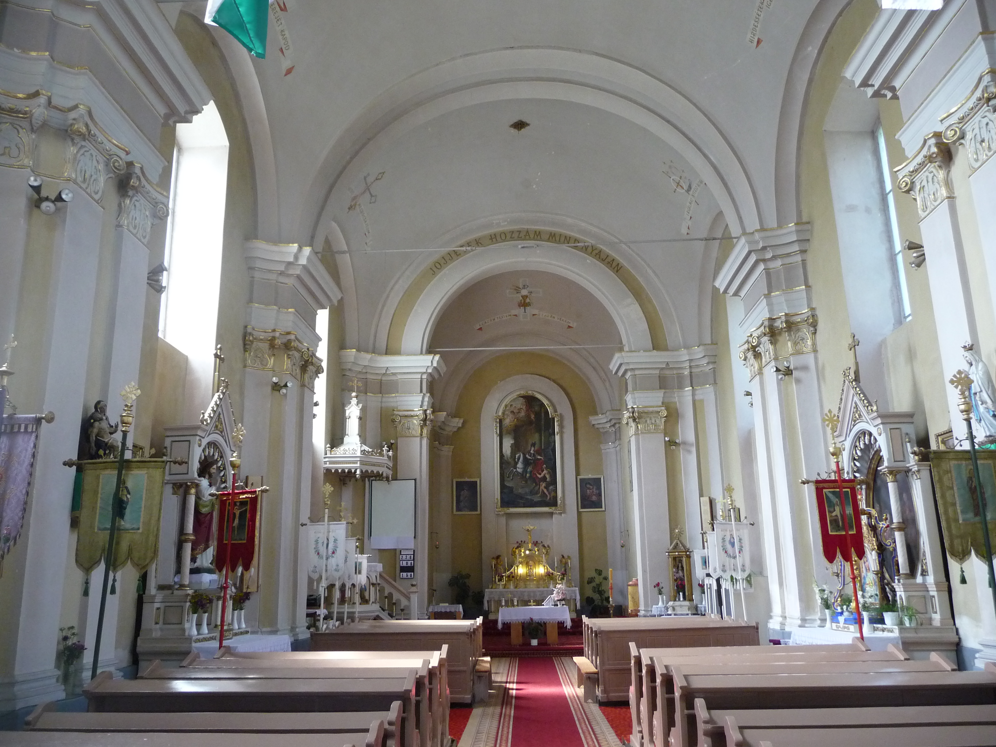 Tours-i Szent Márton templom, Bujákc